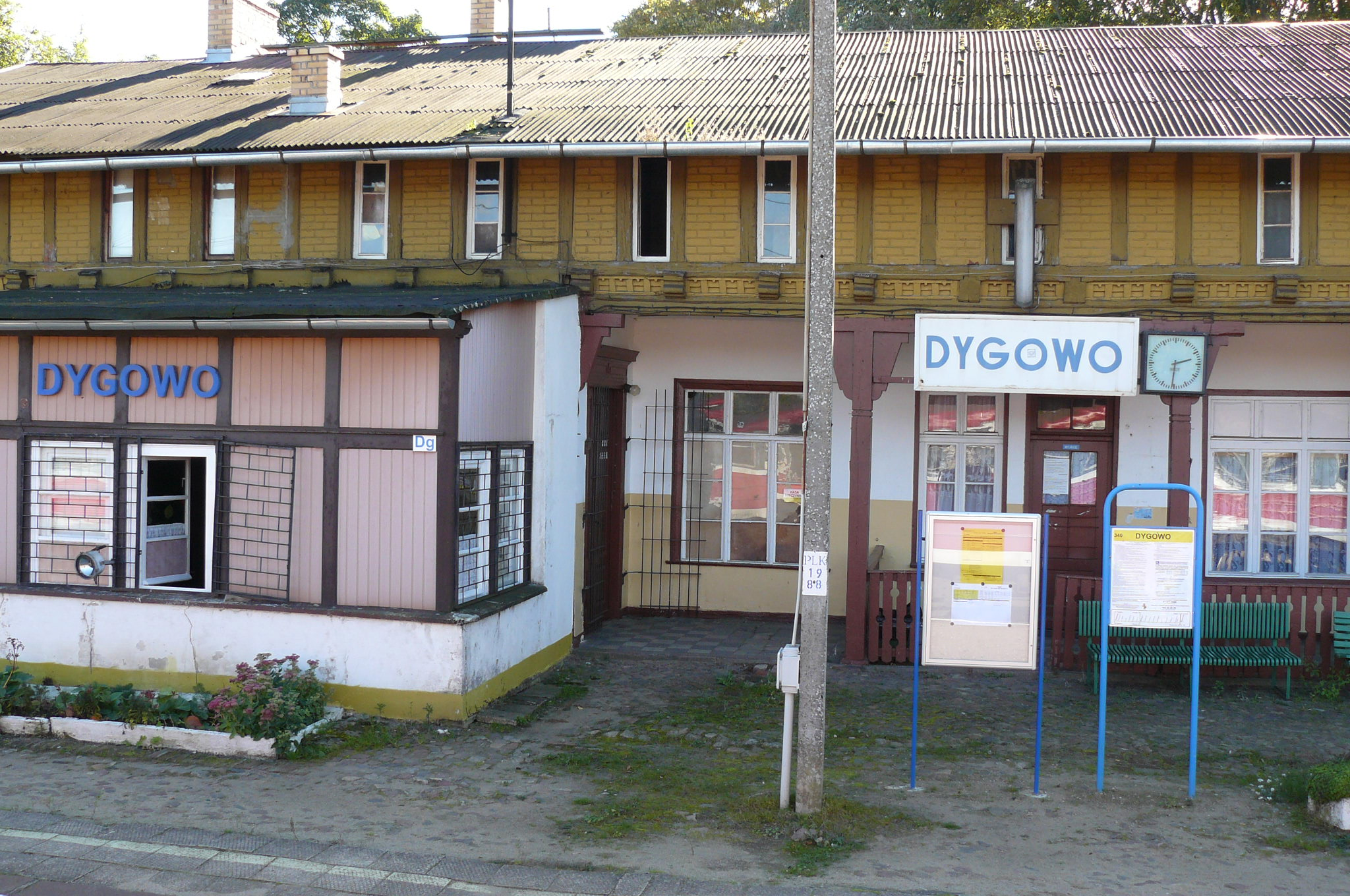 Dworzec kol. w Dygowie.